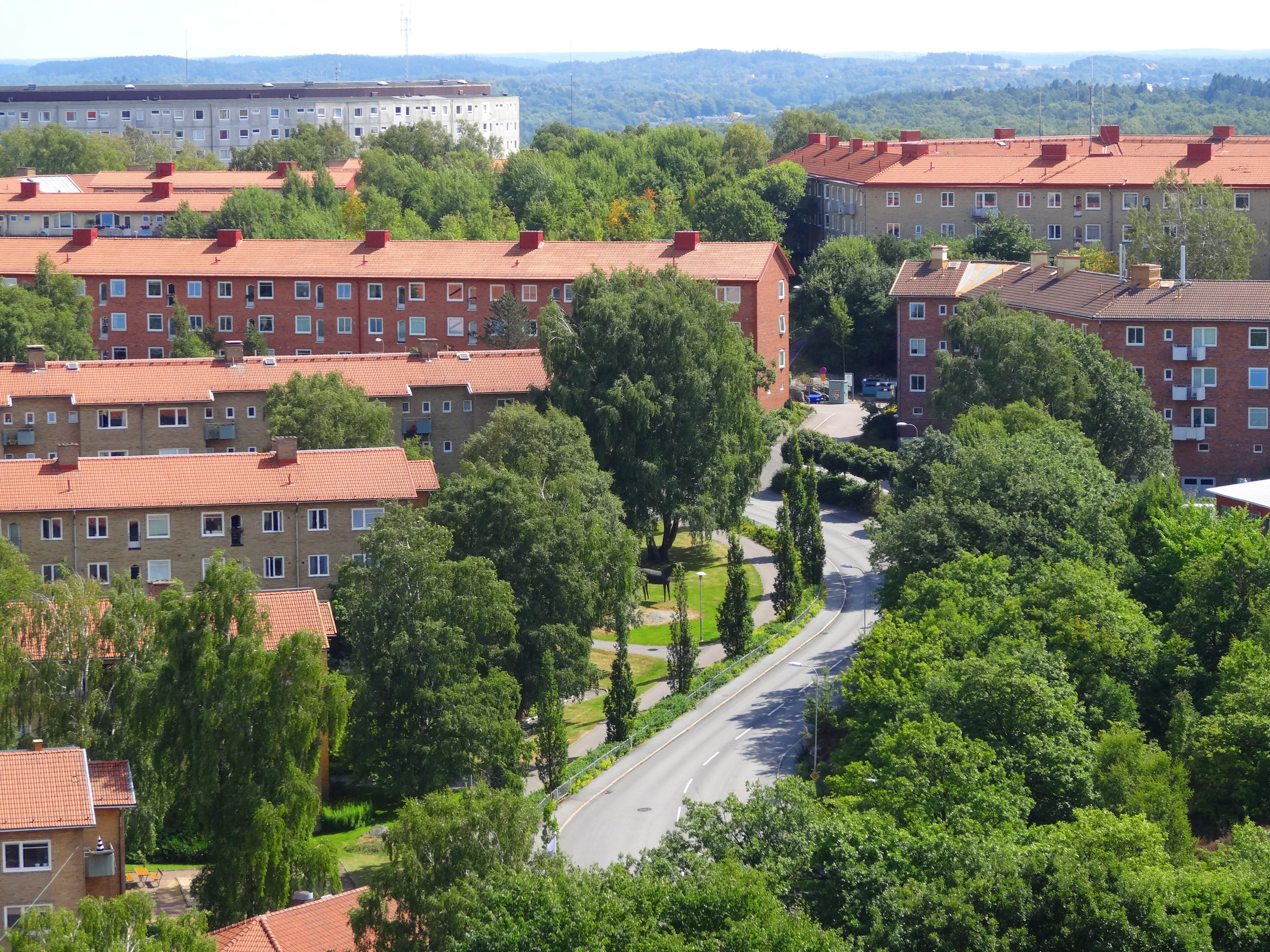 Vy över Doktor Allards gata i Göteborg från Guldhedens vattentorn.